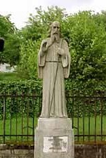 Fontaine de Saint Fromond, Bonfol, canton du Jura, Suisse